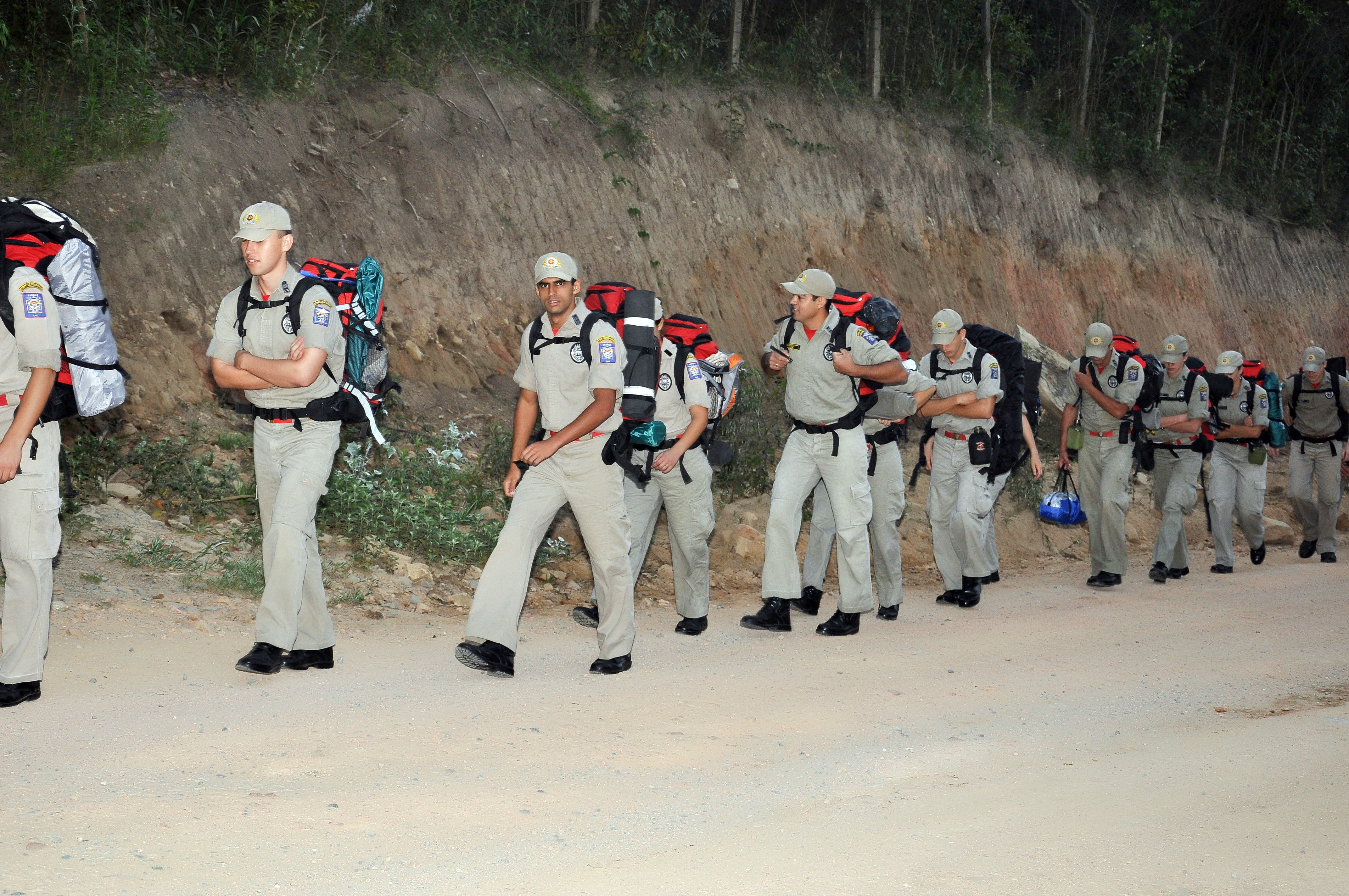 Marcha a pé realizada pelos cadetes do Curso de Formação de Oficial Bombeiro Militar do Estado do Paraná.